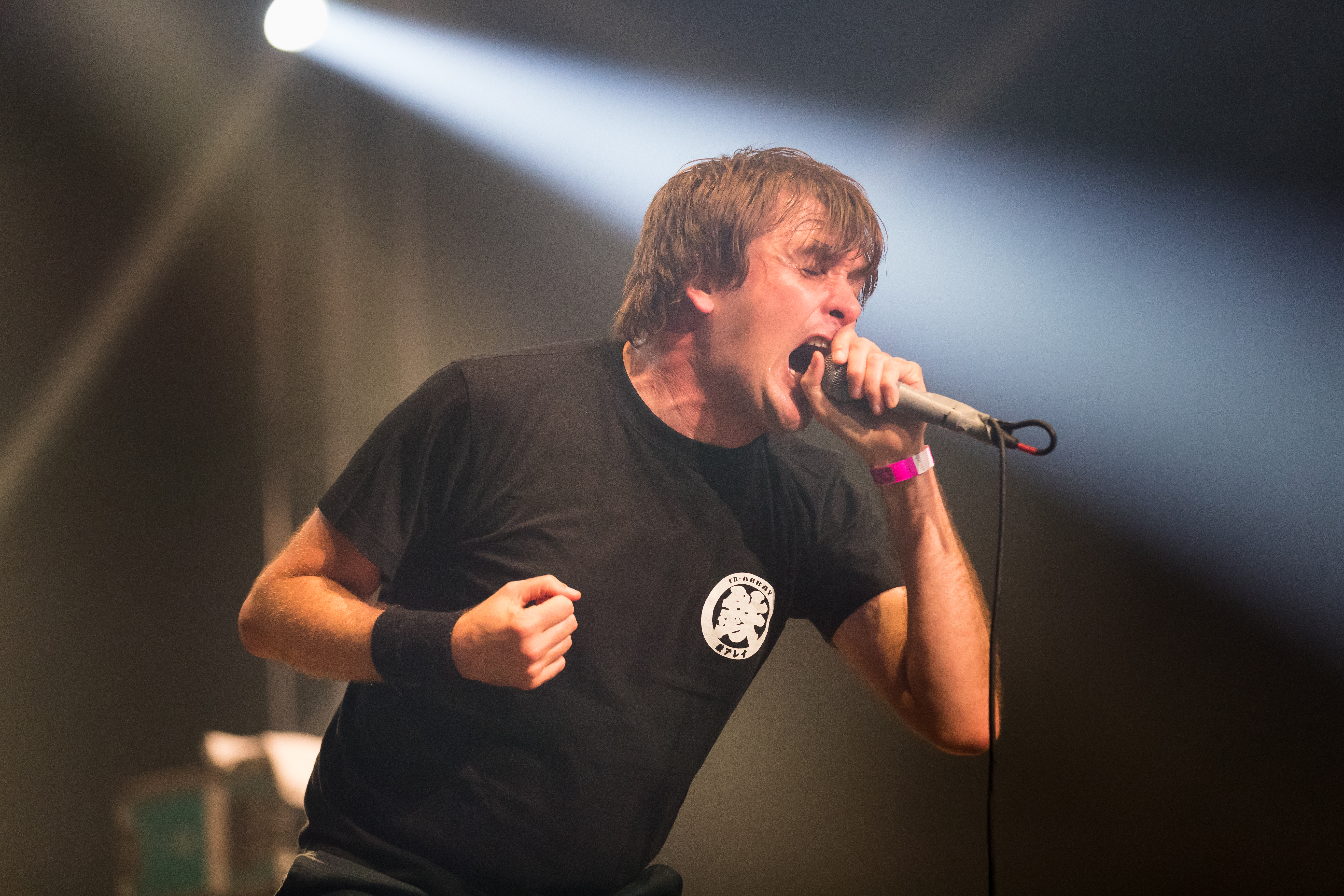 Napalm Death during Wacken Open Air at Schleswig-Holstein, Wacken, , Germany on 2017-08-03, Photo: Sven Mandel